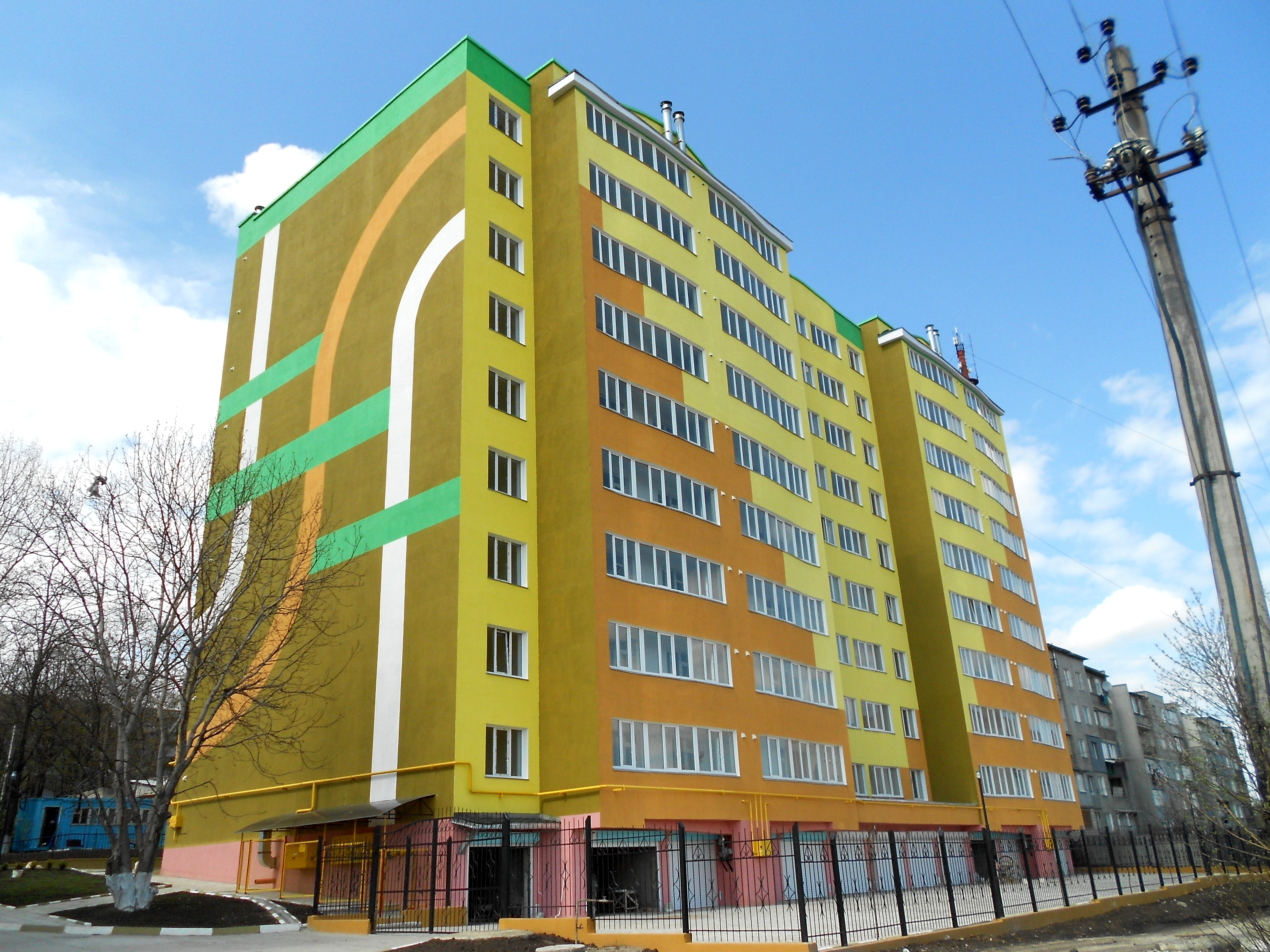 Bloc locativ în Bălți